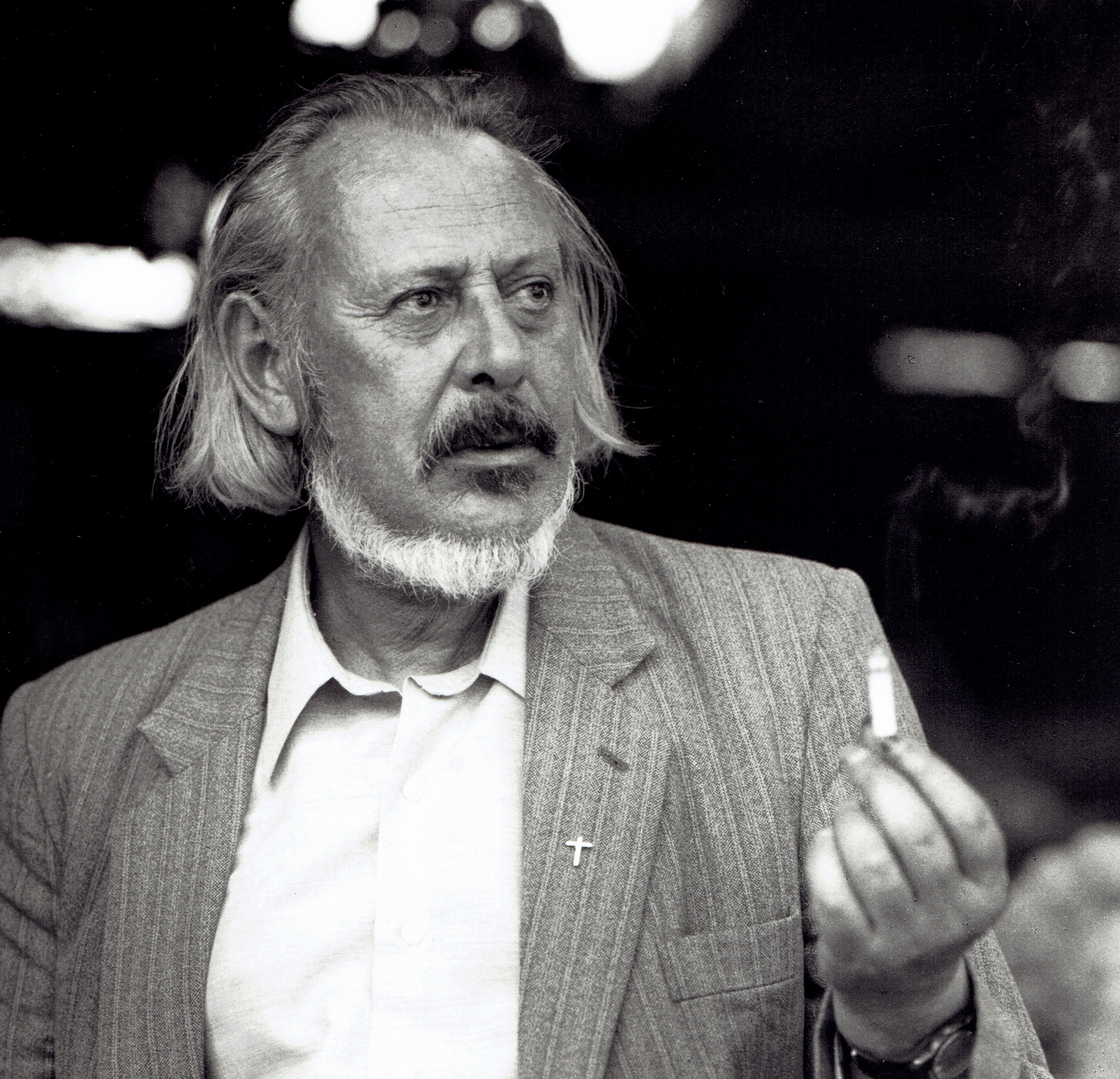 Djoos Utendoale - Pater Joris Declerck - 14.08.1981 - Westouter - foto Bernhard De Grendel